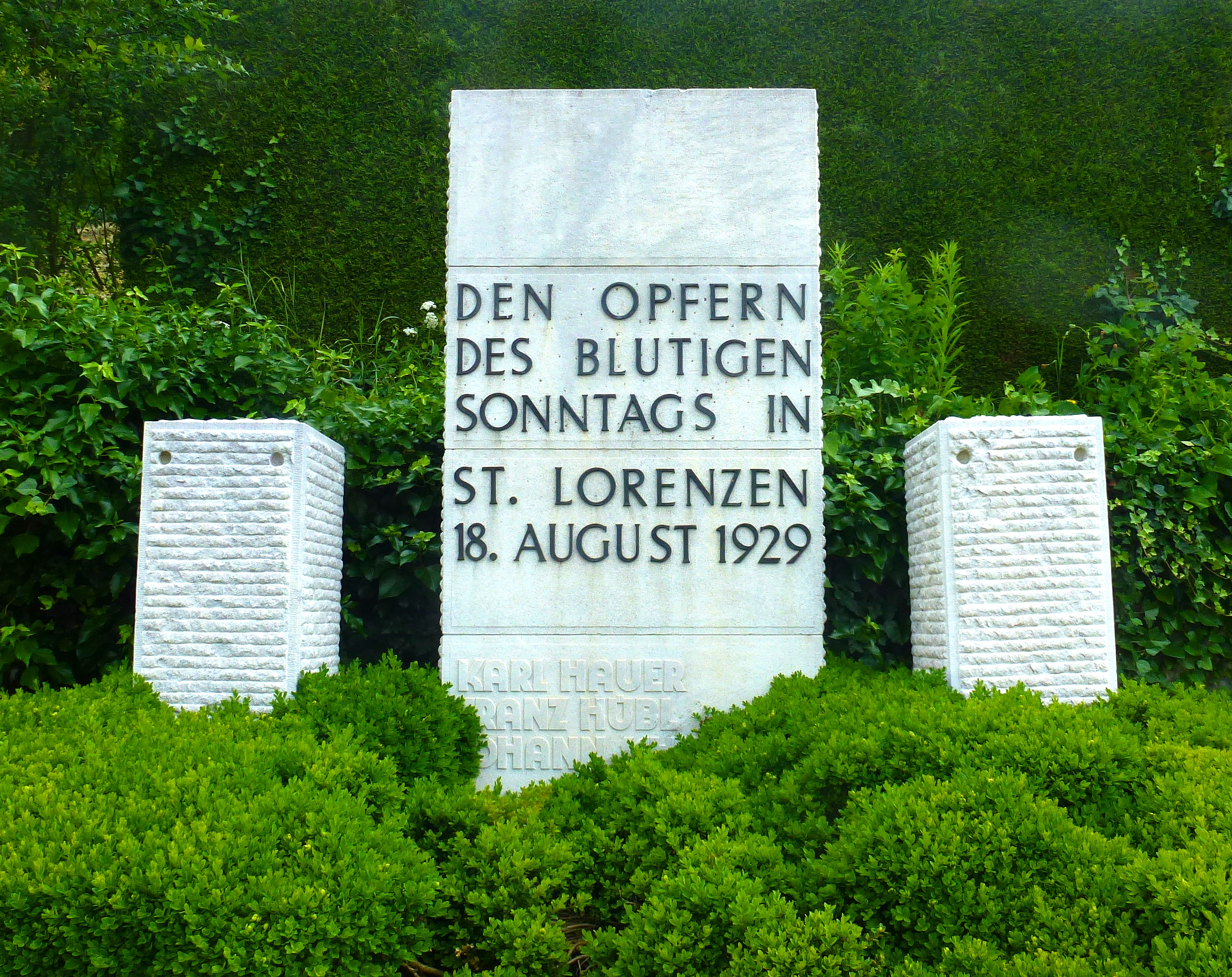 Denkmal zum Lorenzer Fenstersturz in Bruck an der Mur